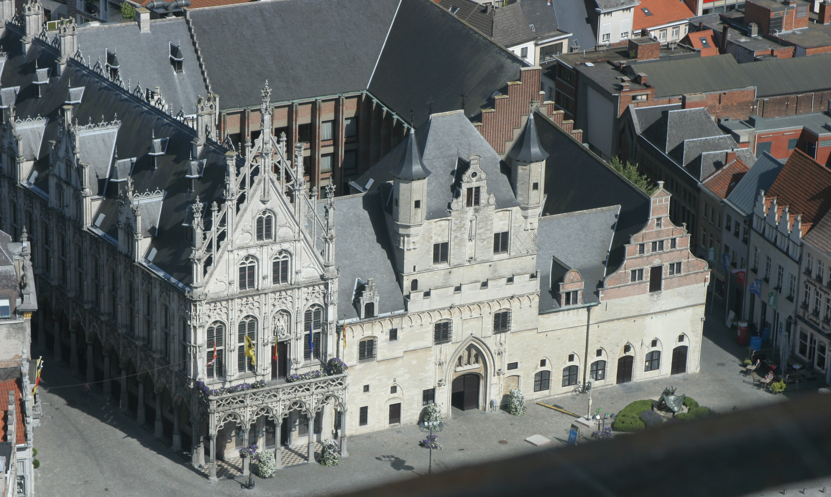 Stadhuis met de voormalige Lakenhalle op de Grote Markt te Mechelen. De foto is genomen vanop deSint-Romboutstoren.